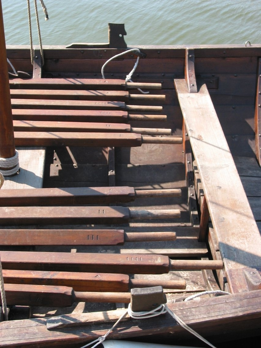 Færøbåden Naddoddur har 12 årer, og en besætning af 14 mænd, hvoraf 12 ror. Fotograferet i Slesvig, Tyskland, august 2004